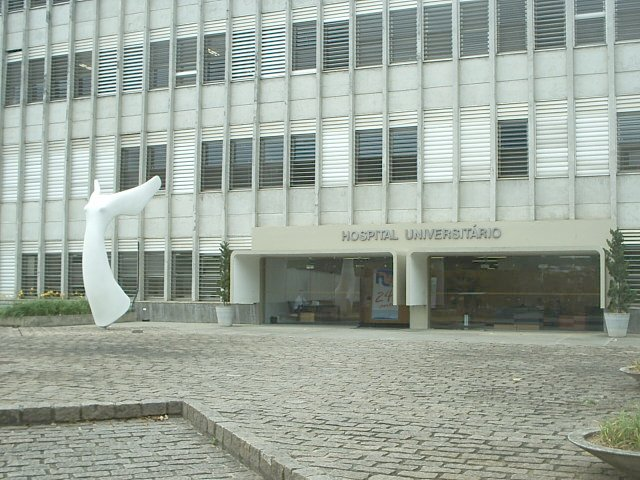 Foto da fachada do Hospital Universitário (HU) na USP